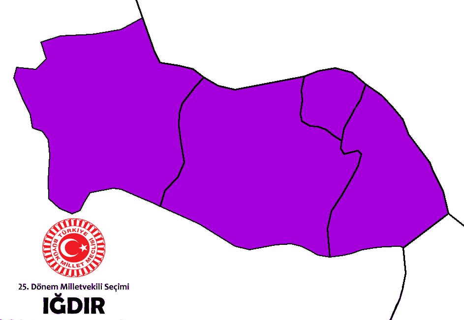 2015 genel seçim sonuçları